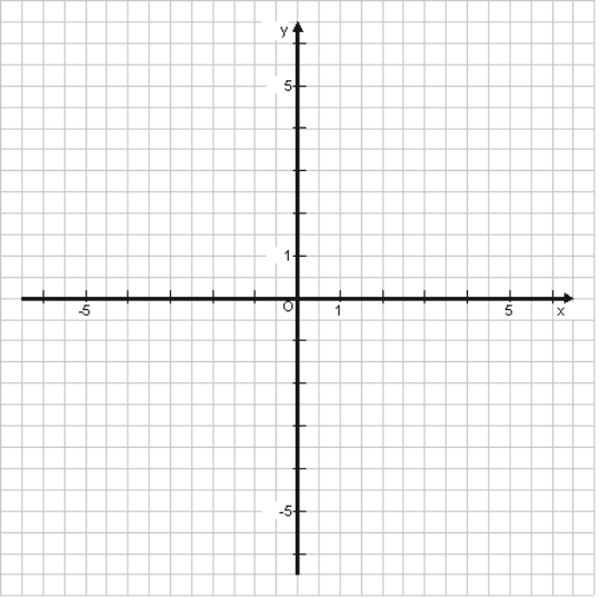 „normales“ Kartesisches Koordinatensystem im zweidimensionalen Raum